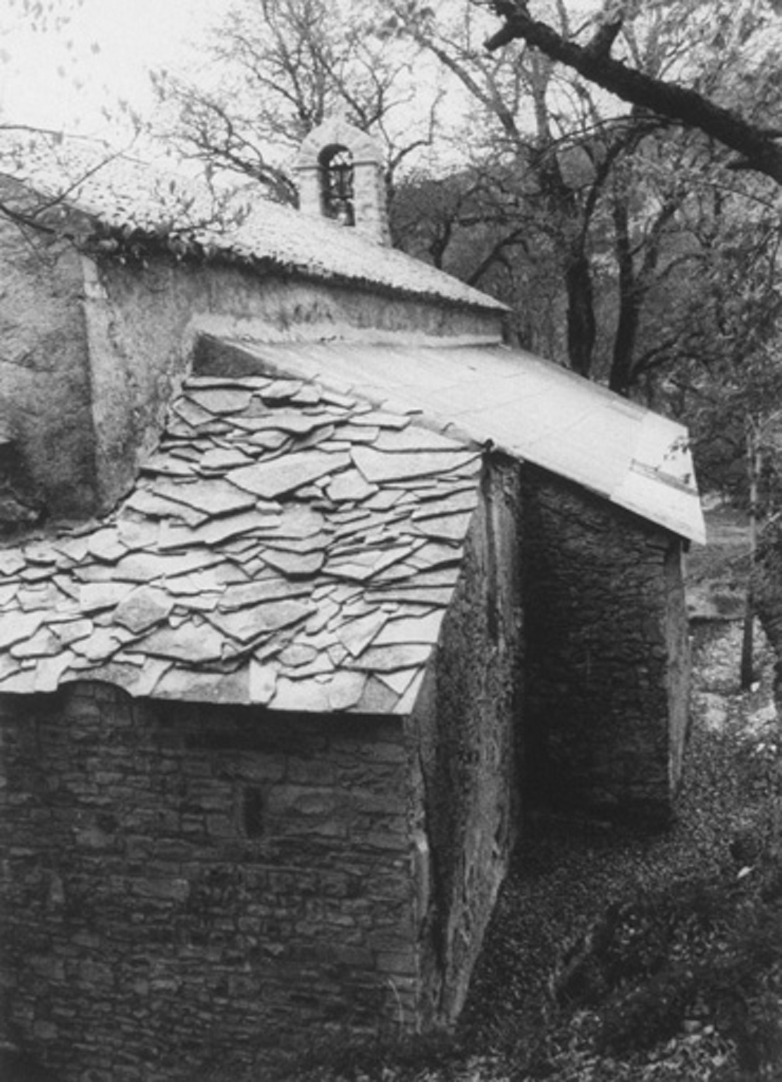 Toit en lauses de l'ermitage de Notre-Dame de Lure